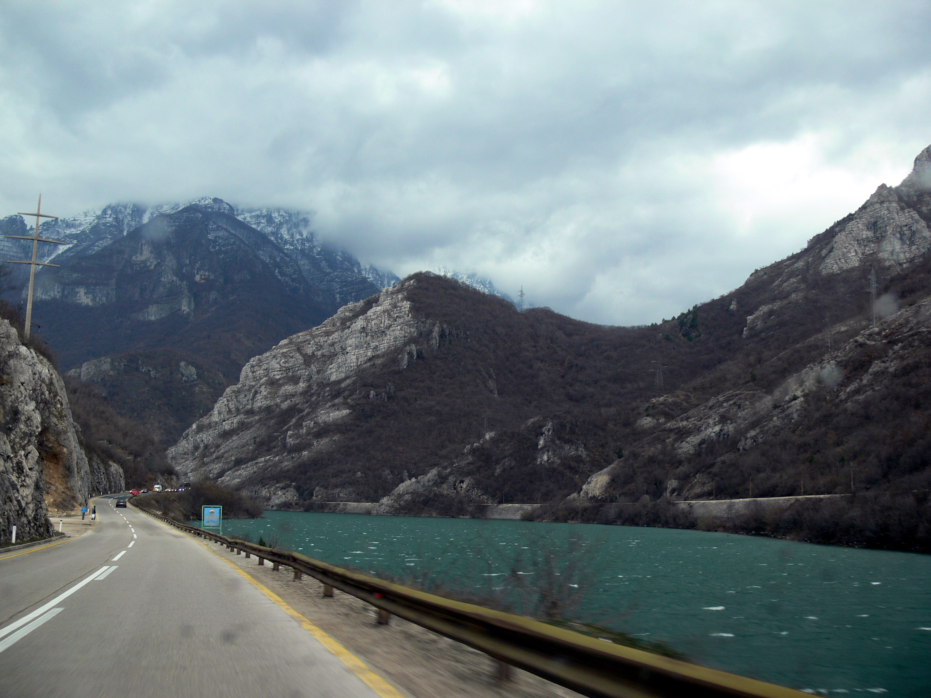 The lake Jablaničko Jezero near the road Sarajevo - Mostar, in Bosnia and Herzegovina.